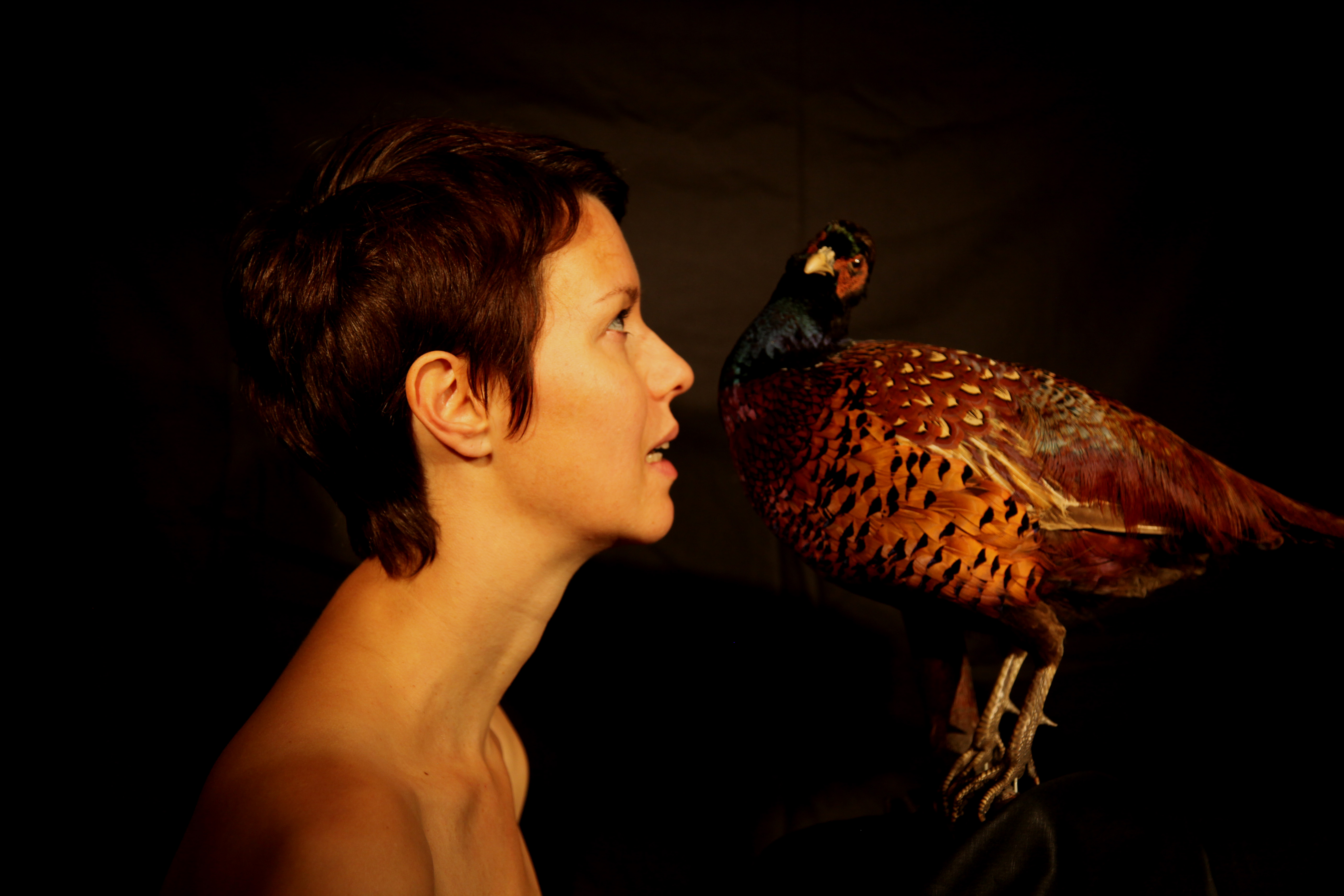 Jana Kasalová, z cyklu Wolfsgrub, video, 2011